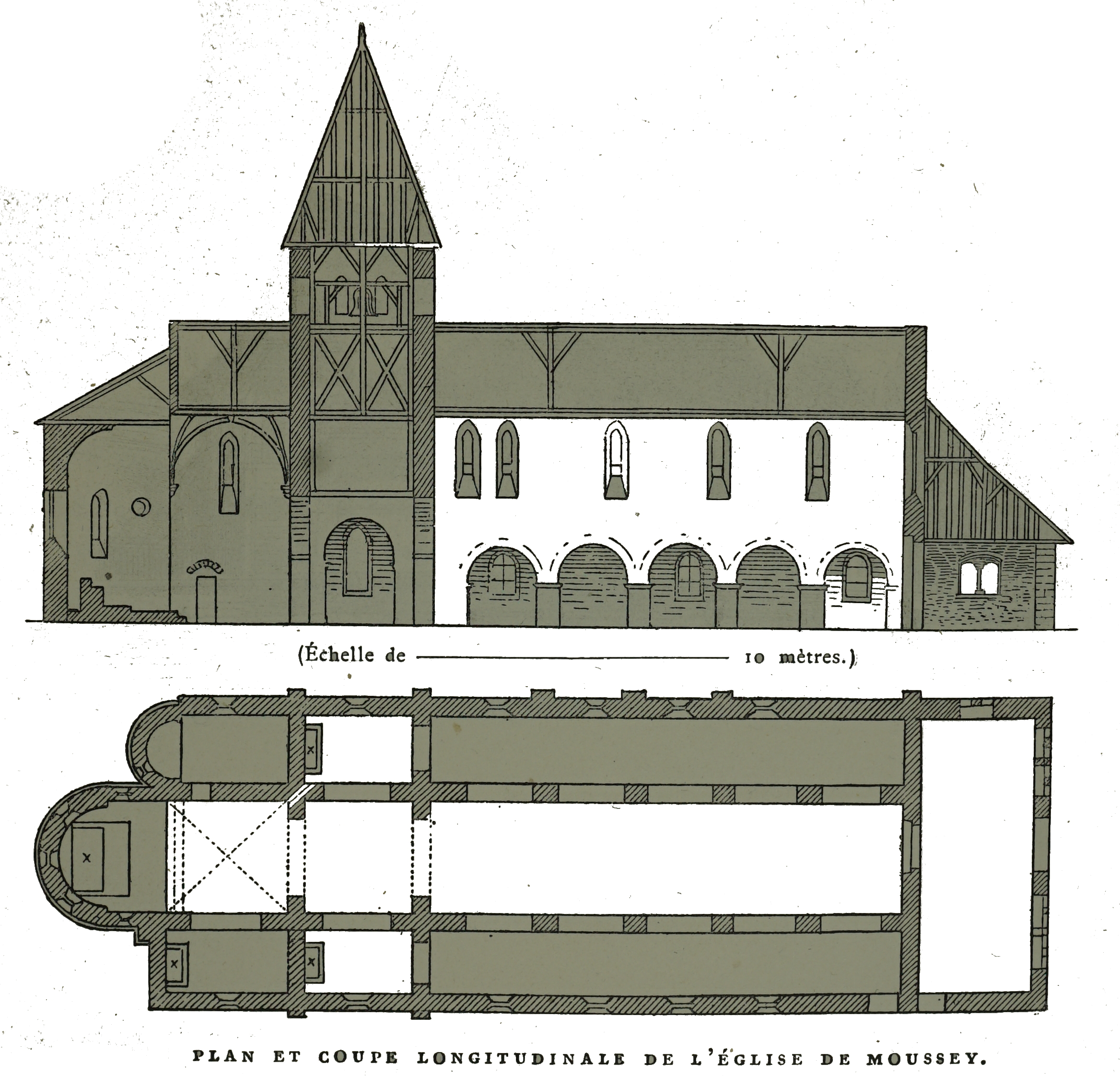 par un dessin de Fichot.